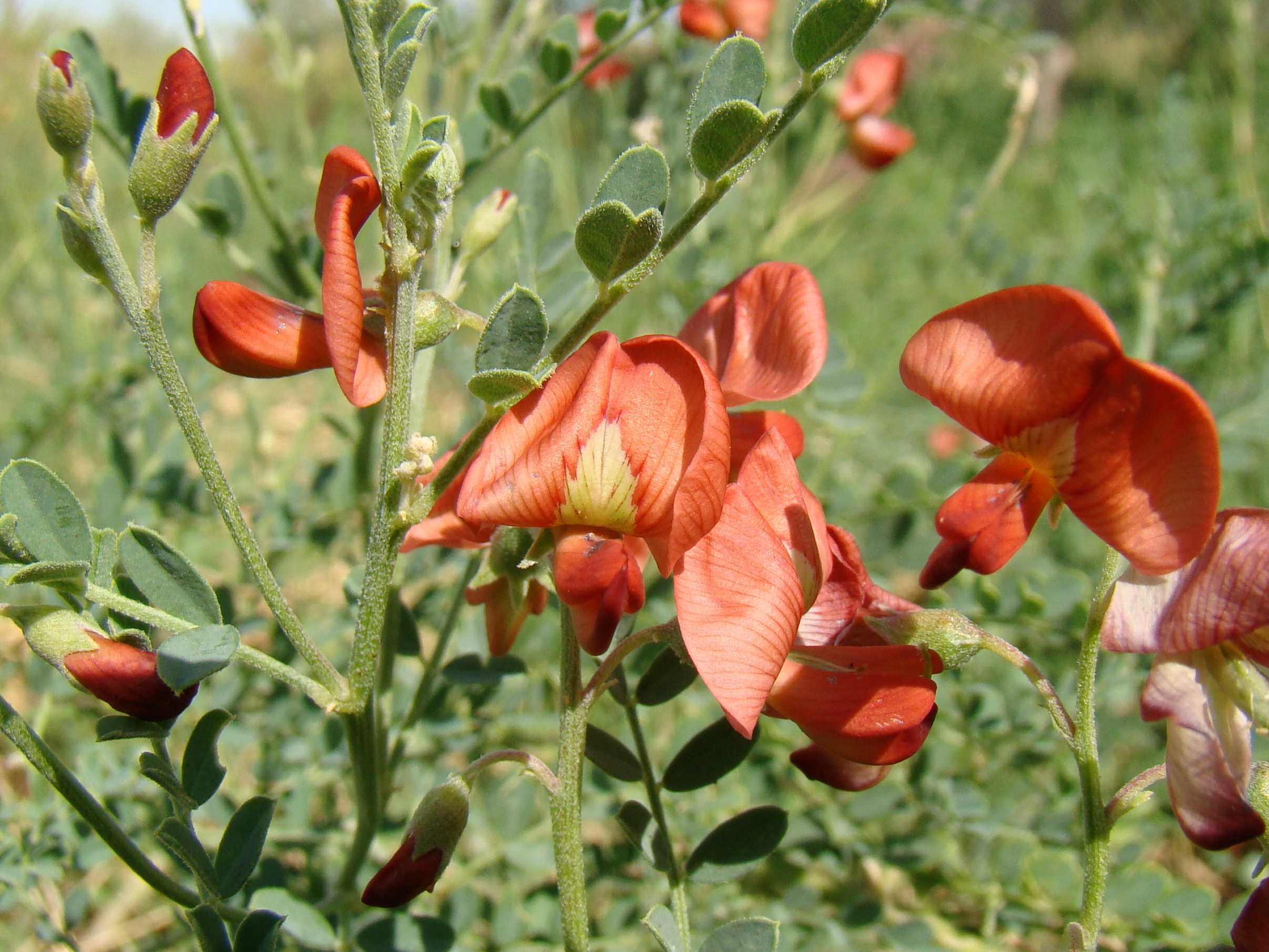 Сферофиза солонцовая (Sphaerophysa salsula). Цветки. Город Байконур, Казахстан.